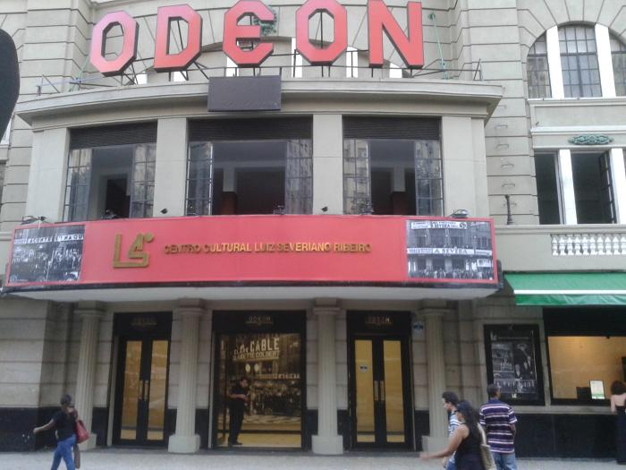 Vista frontal do Cine ODEON Centro Cultural Luiz Severiano Ribeiro